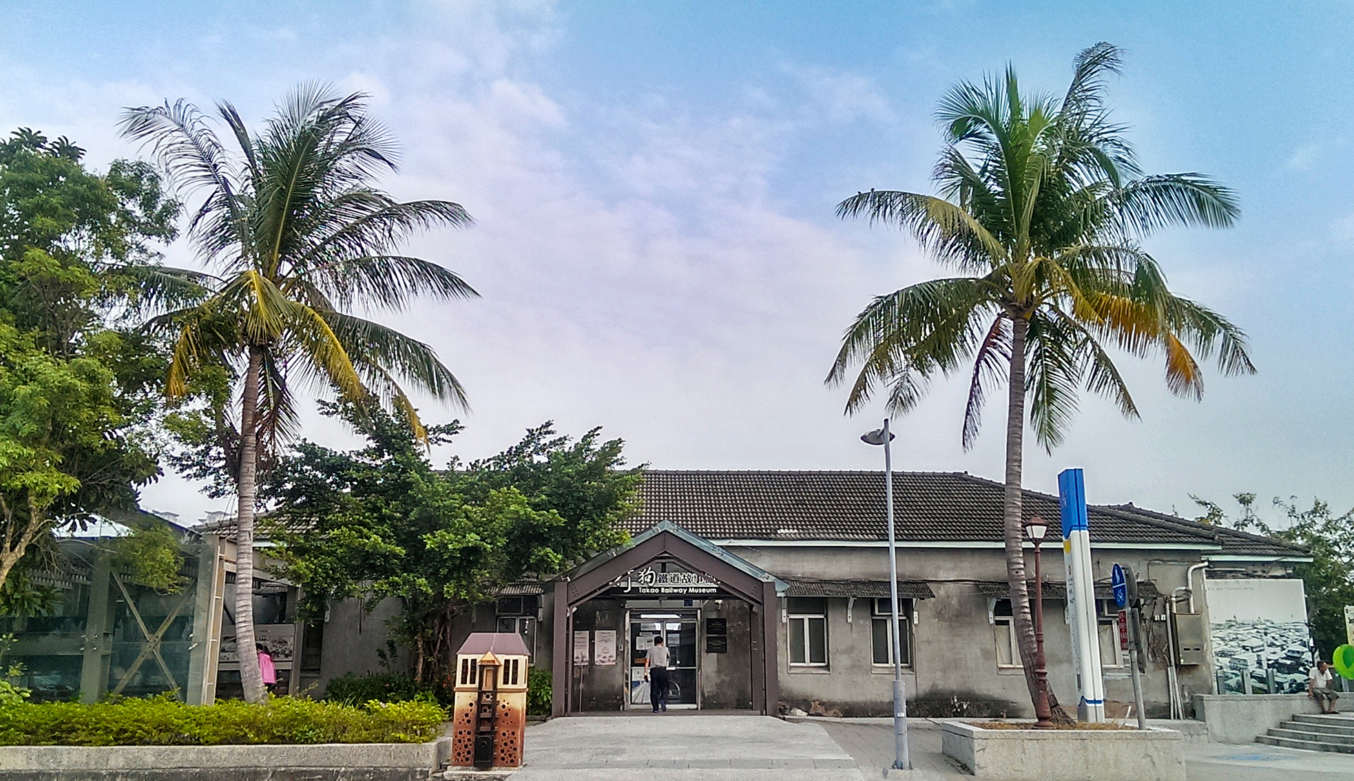 中文（台灣）: 打狗鐵道故事館